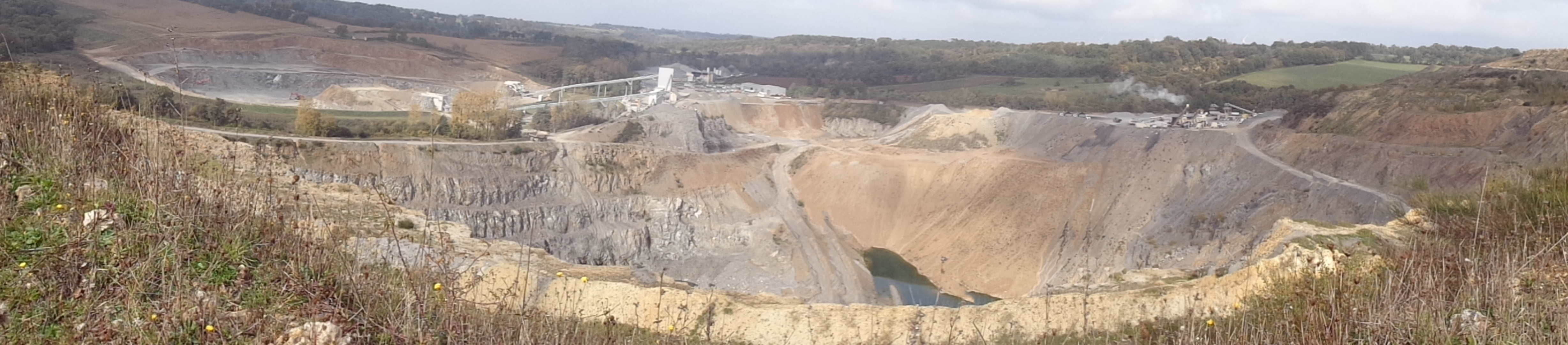 Carrière de diorite située sur la commune de Mouterre-sur-Blourde